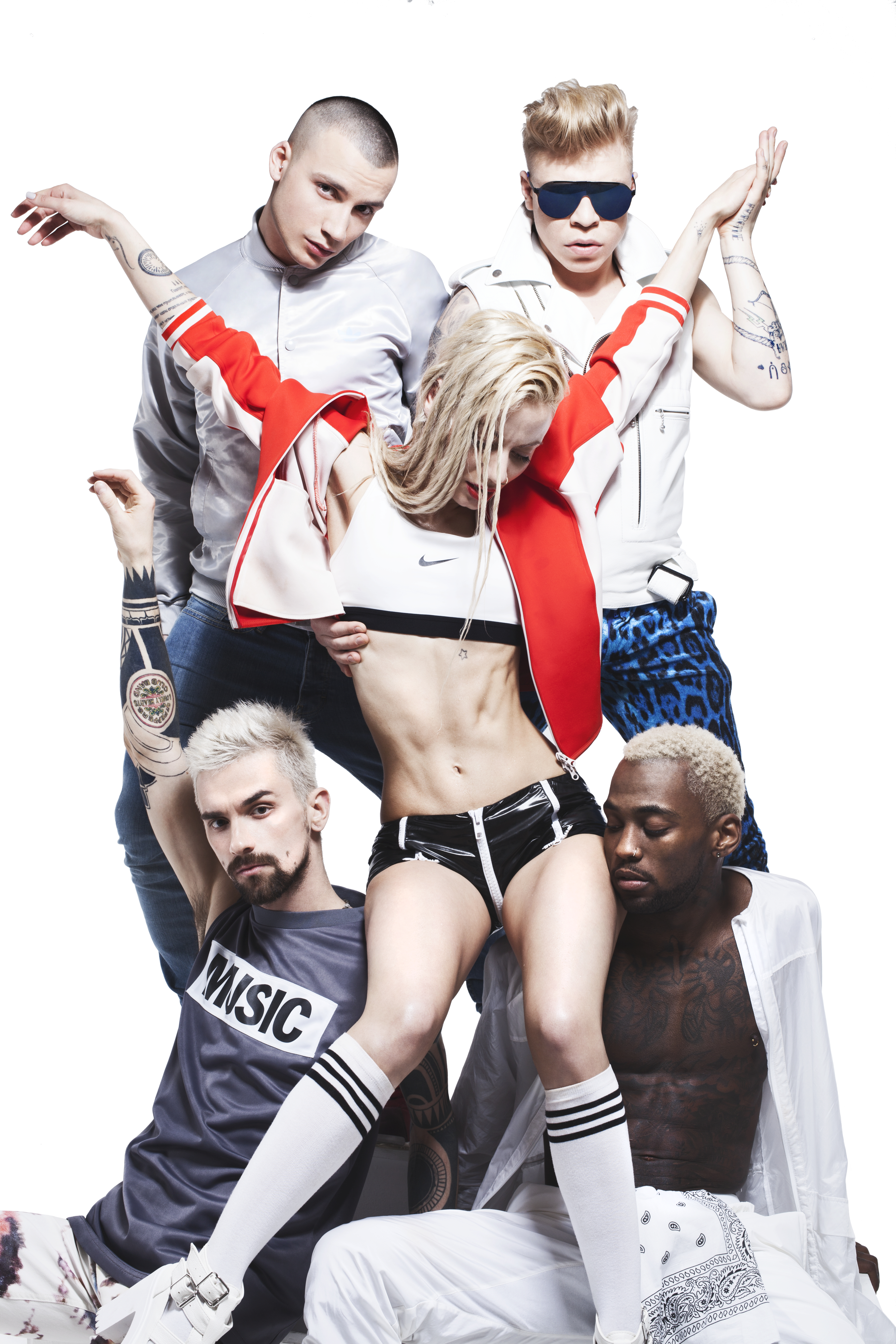 Фотосессия